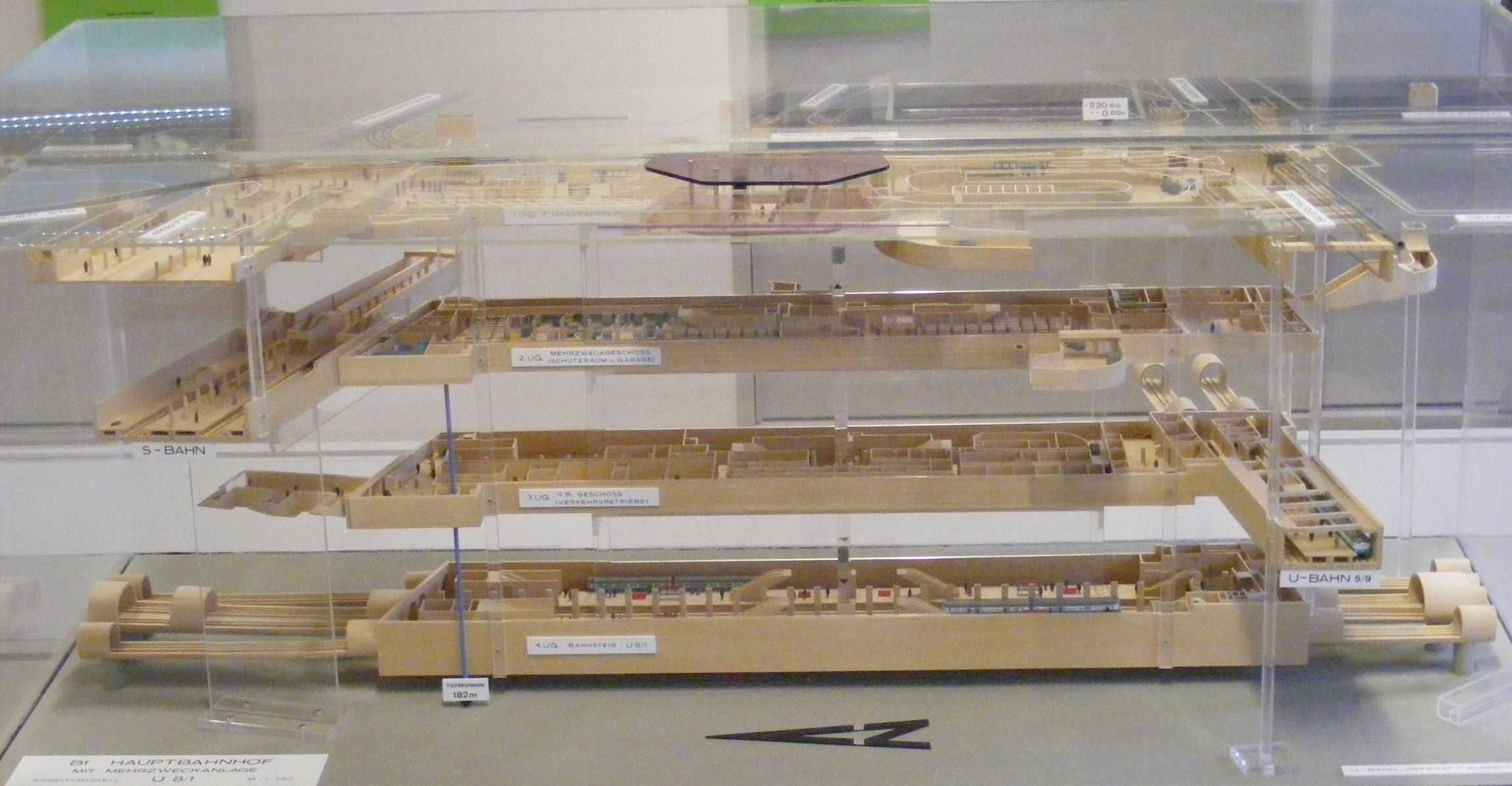 Modell der Ebenen des U- und S-Bahnhofes Hauptbahnhof München, ausgestellt im MVG Museum, München